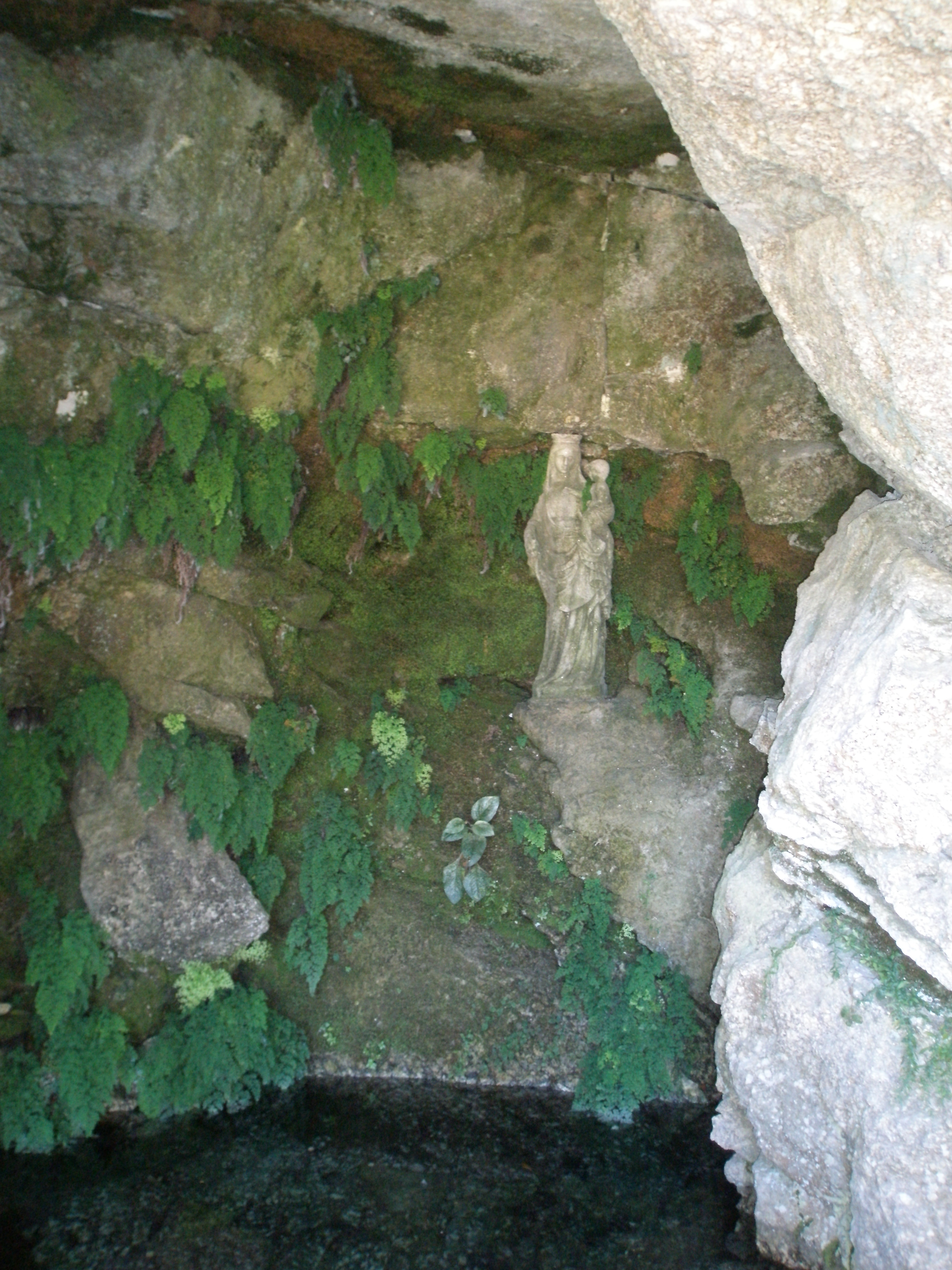 Gruta mandada escavar pela Confraria